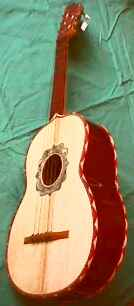 Vihuela mexicana 134 x 306 (4.934 Bytes)